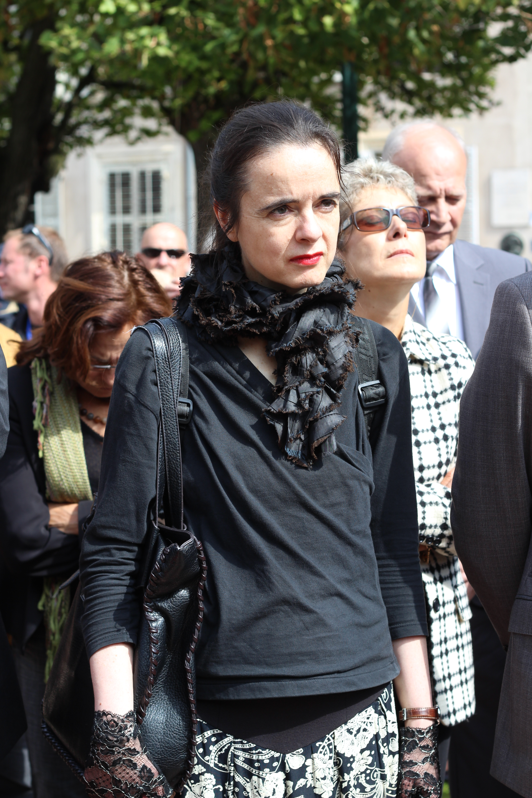 Au Livre sur la Place de Nancy, en septembre 2013.